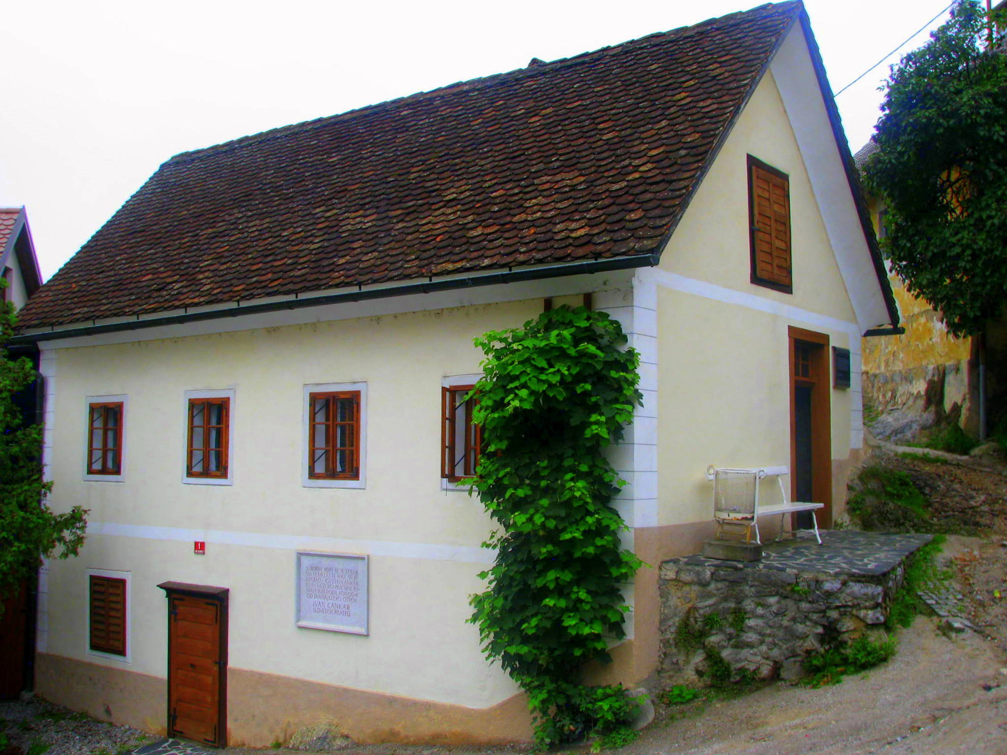 Cankar memorial house, Vrnika, Slovenia